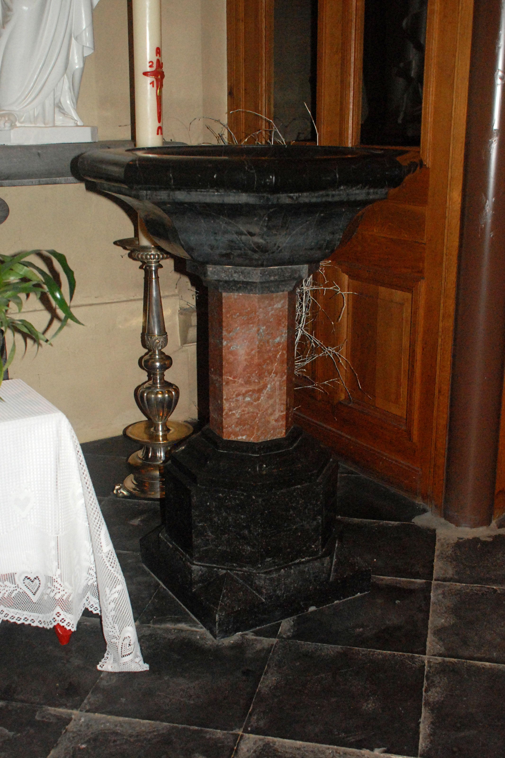 Belgique - Brabant wallon - Ottignies - Église Saint-Rémi